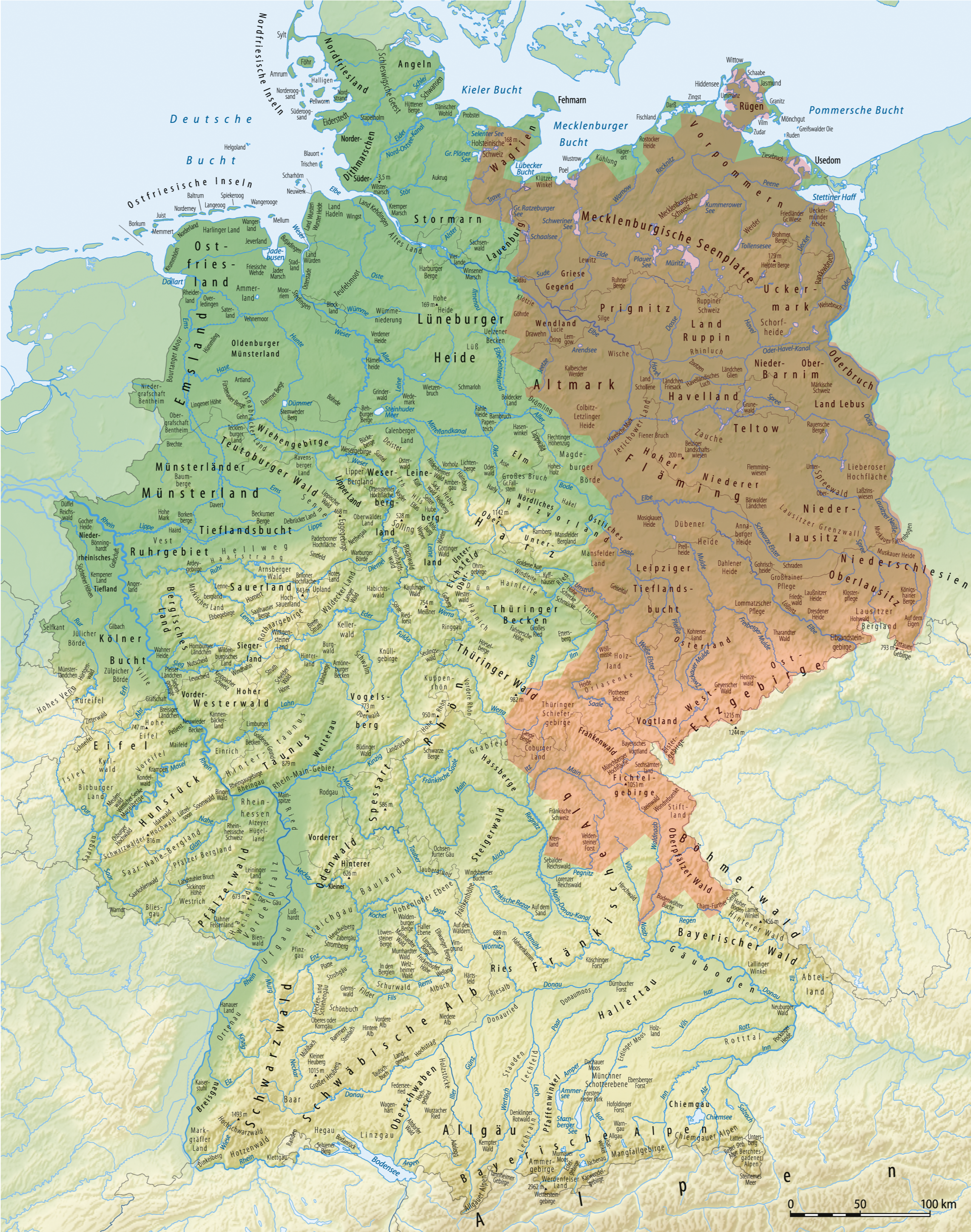 Karte der Verteilung von Ortsnamen mit der Endung -itz in Deutschland